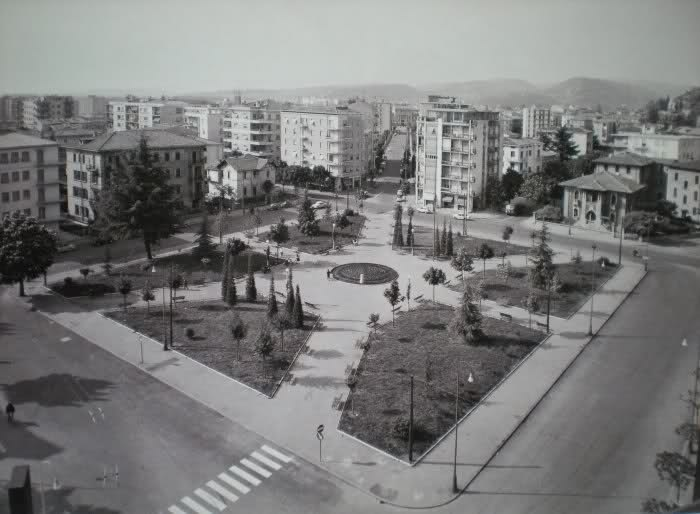 Piazza Vittorio Veneto a Verona (in borgo Trento) in una fotografia degli anni 1960. Notare l'assenza della fontana in mezzo, edificata solo nel 1966 per i festeggiamenti dell'Unità d'Italia